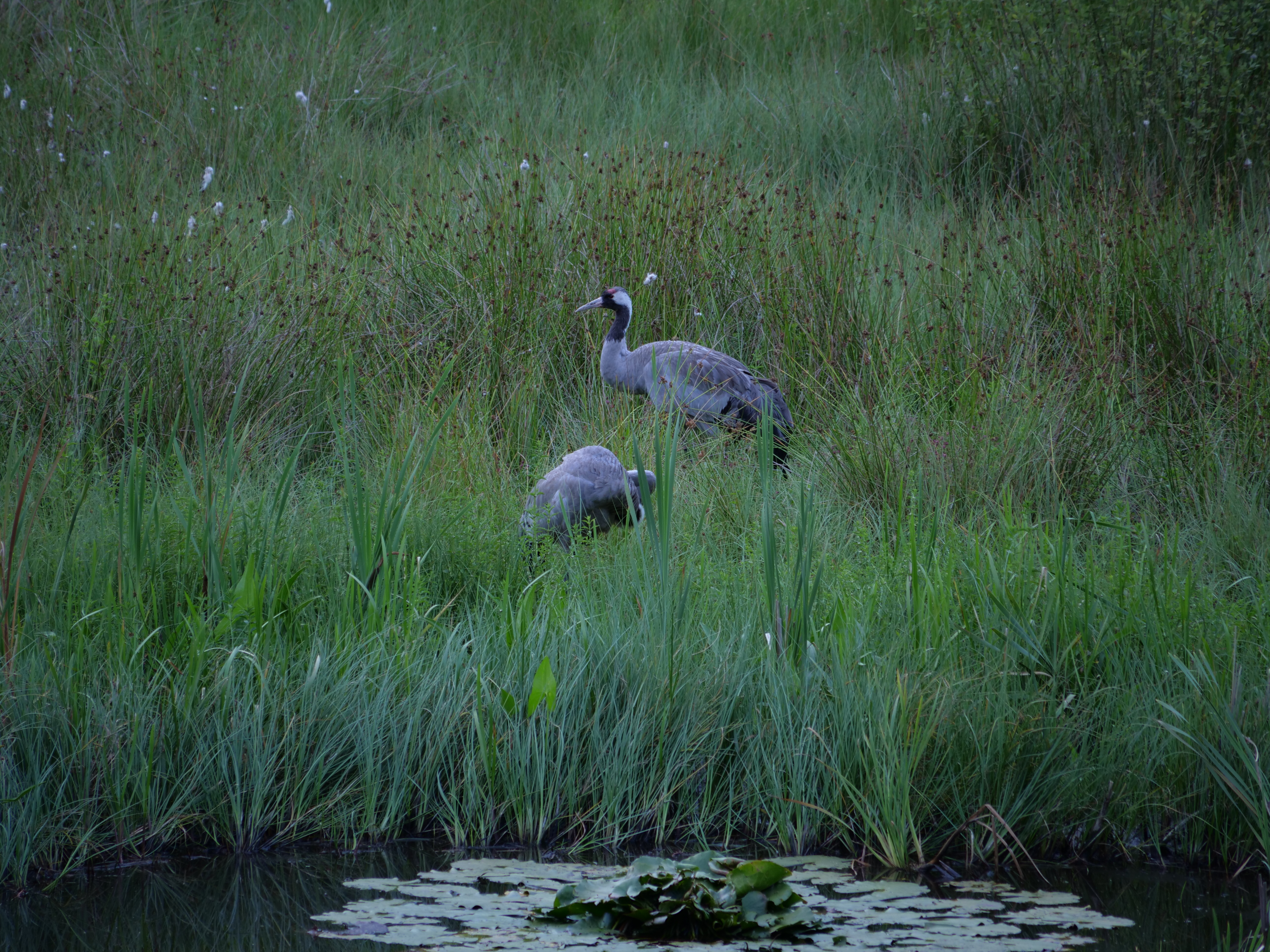 Kranichpärchen am Pechsee im Naturschutzgebiet Barssee und Pechsee.